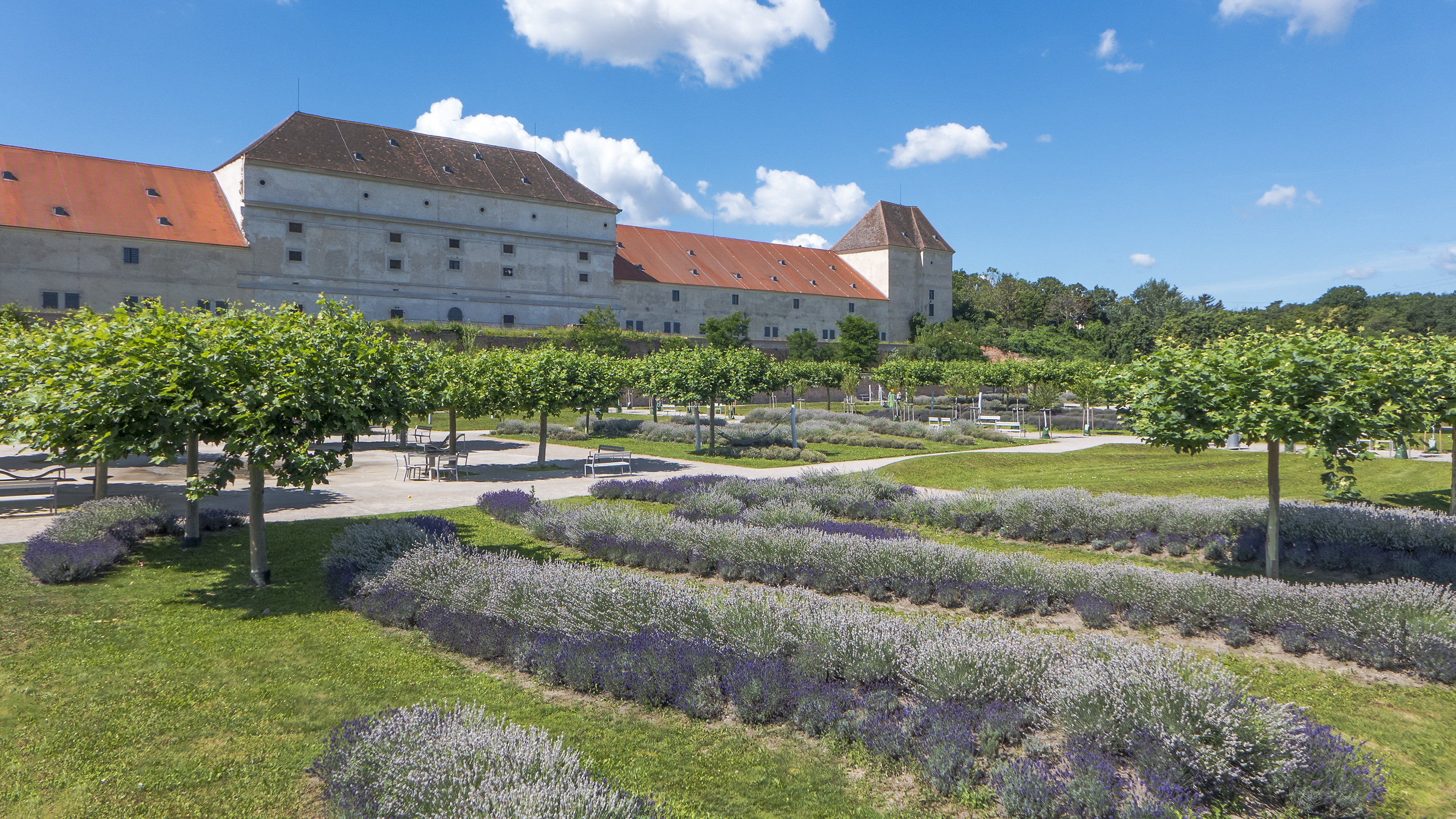 Schloss Neugebäude in Wien 11